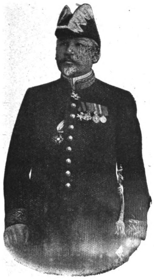 Hornjoserbsce: Jan Arnošt Holan (1853–1921); serbski gymnazialny wučer a spisowaćel.